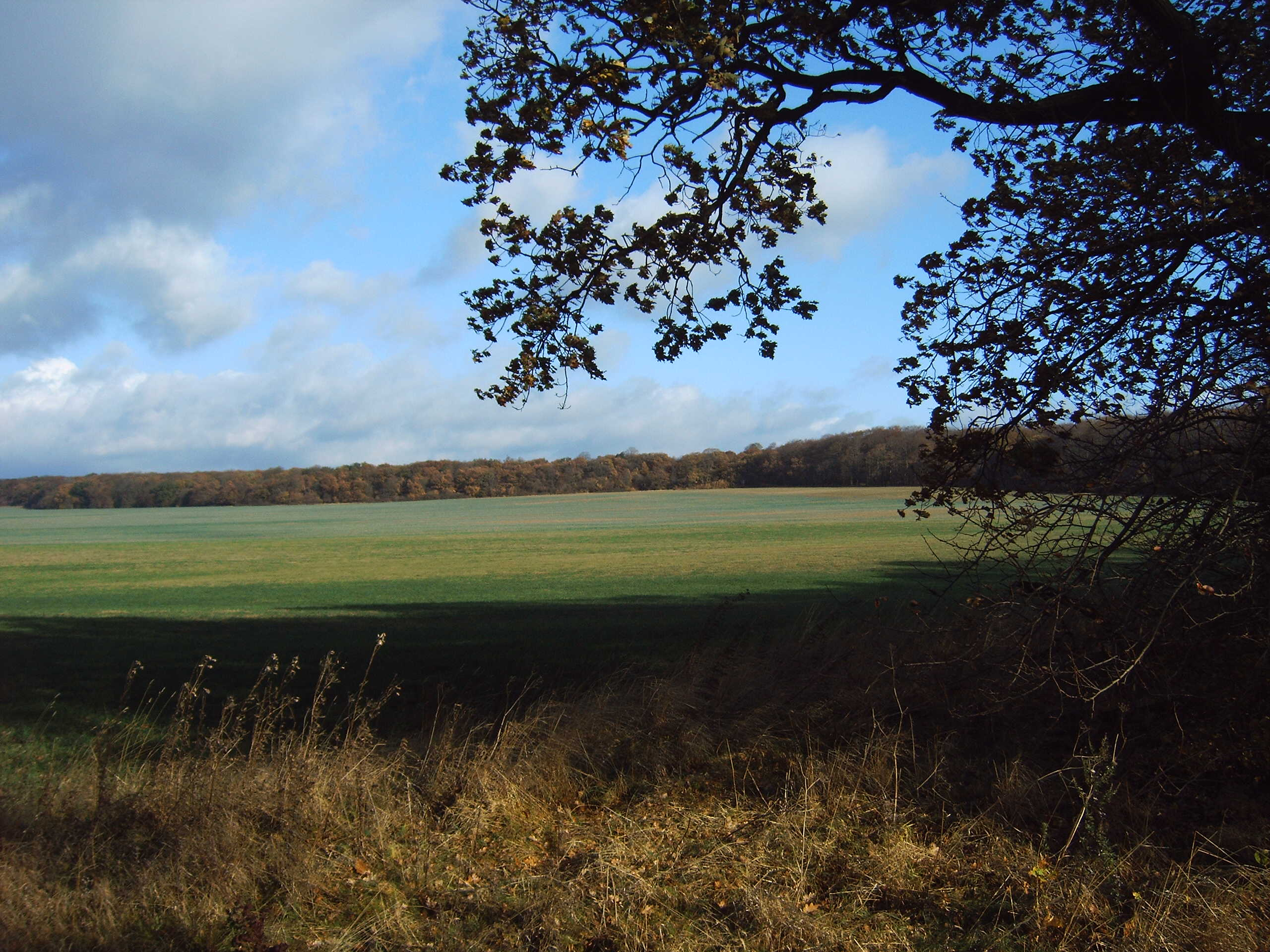 Hakel (südwestliche Seite), Saxony-Anhalt, Germany